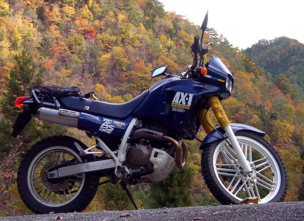 自分の所有するAX-1